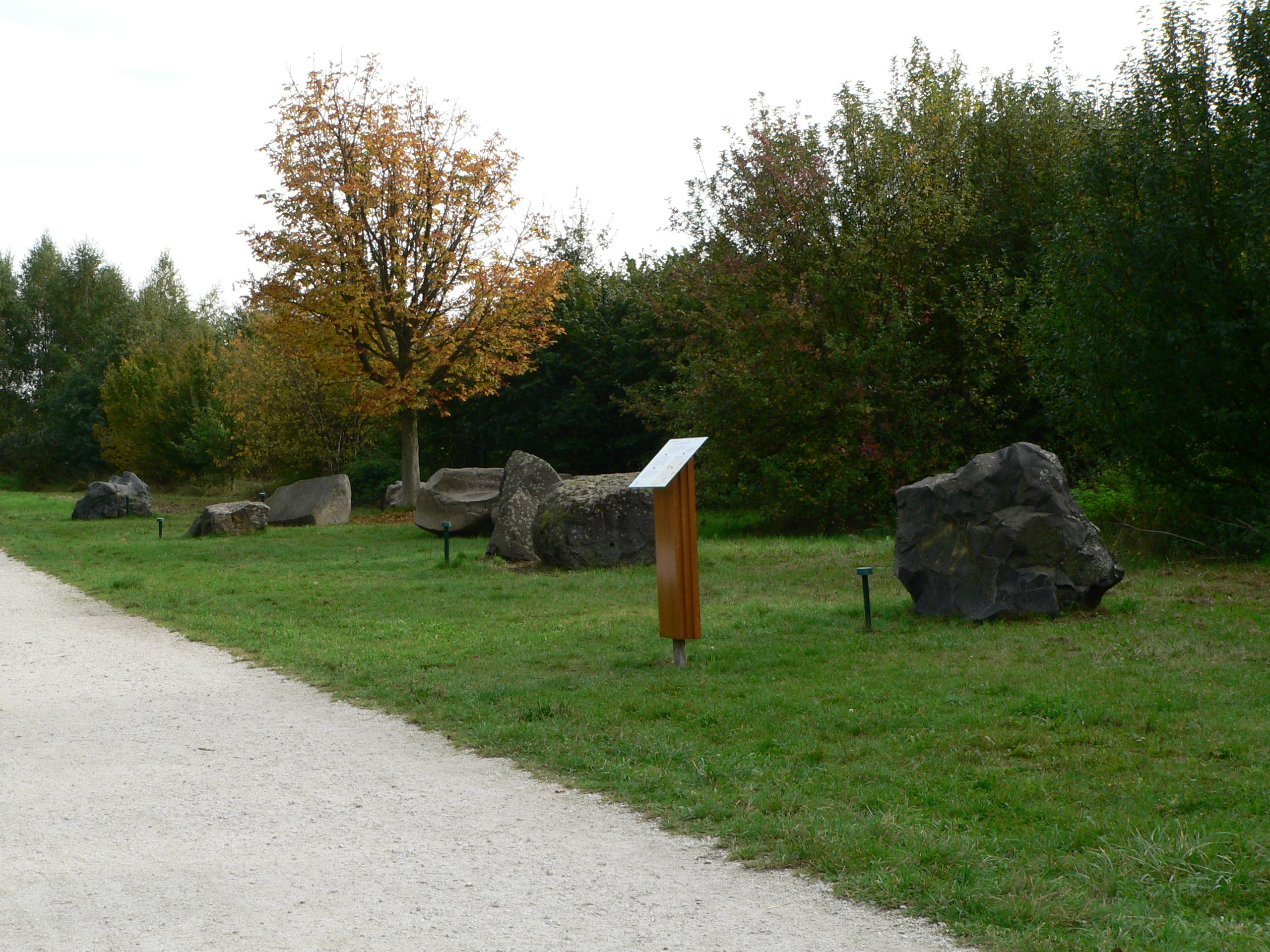 Steinlehrpfad im Arboretum Main Taunus